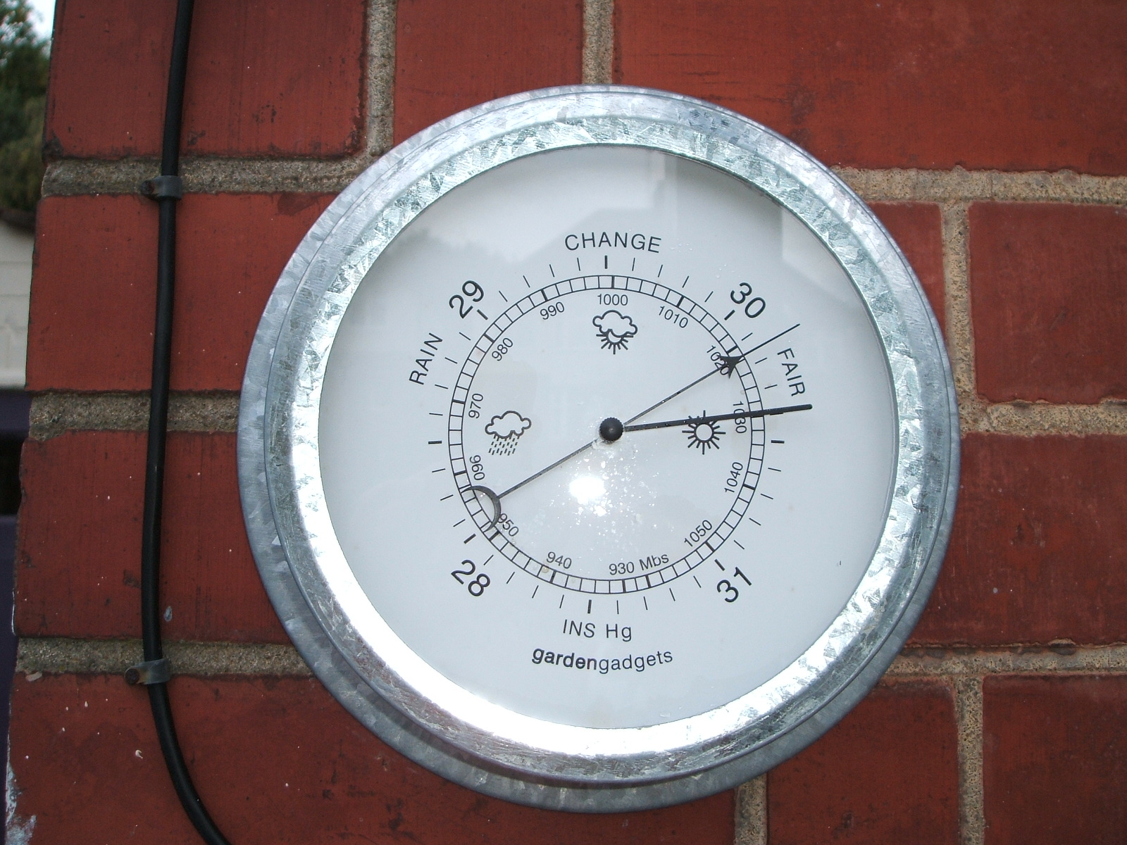 modern aneroid barometer